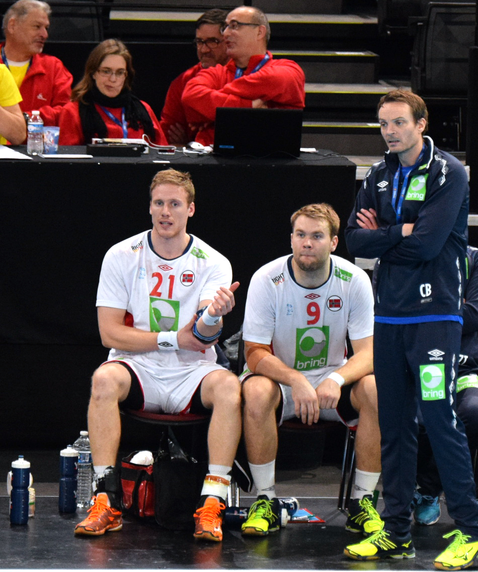 Le 10 janvier 2016 lors du match Norvège / Qatar durant la Golden League à l'AccordHotel Arena (Paris). Magnus Gullerud-Petter Øverby-Christian Berge